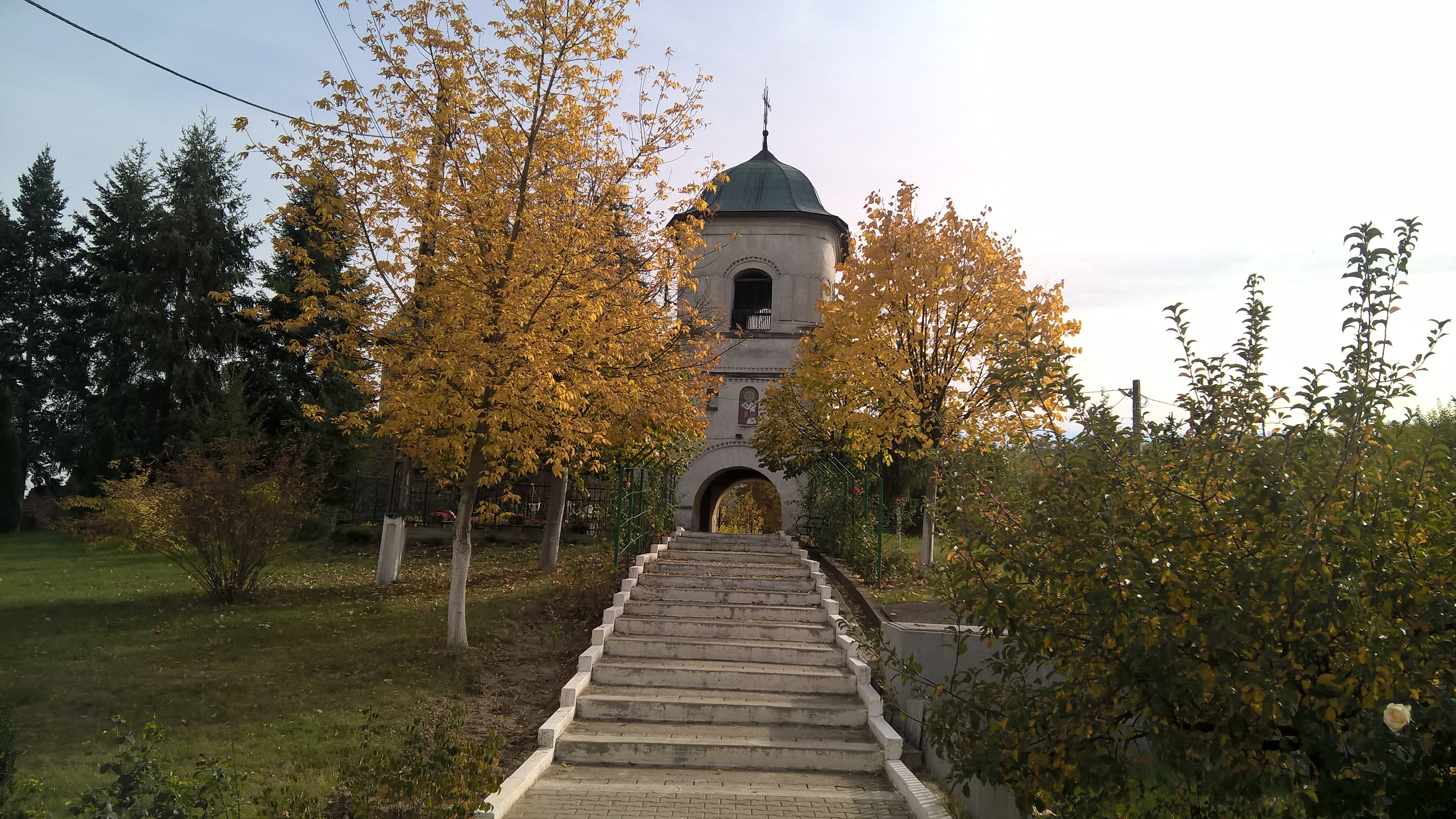 Turn clopotniță 05